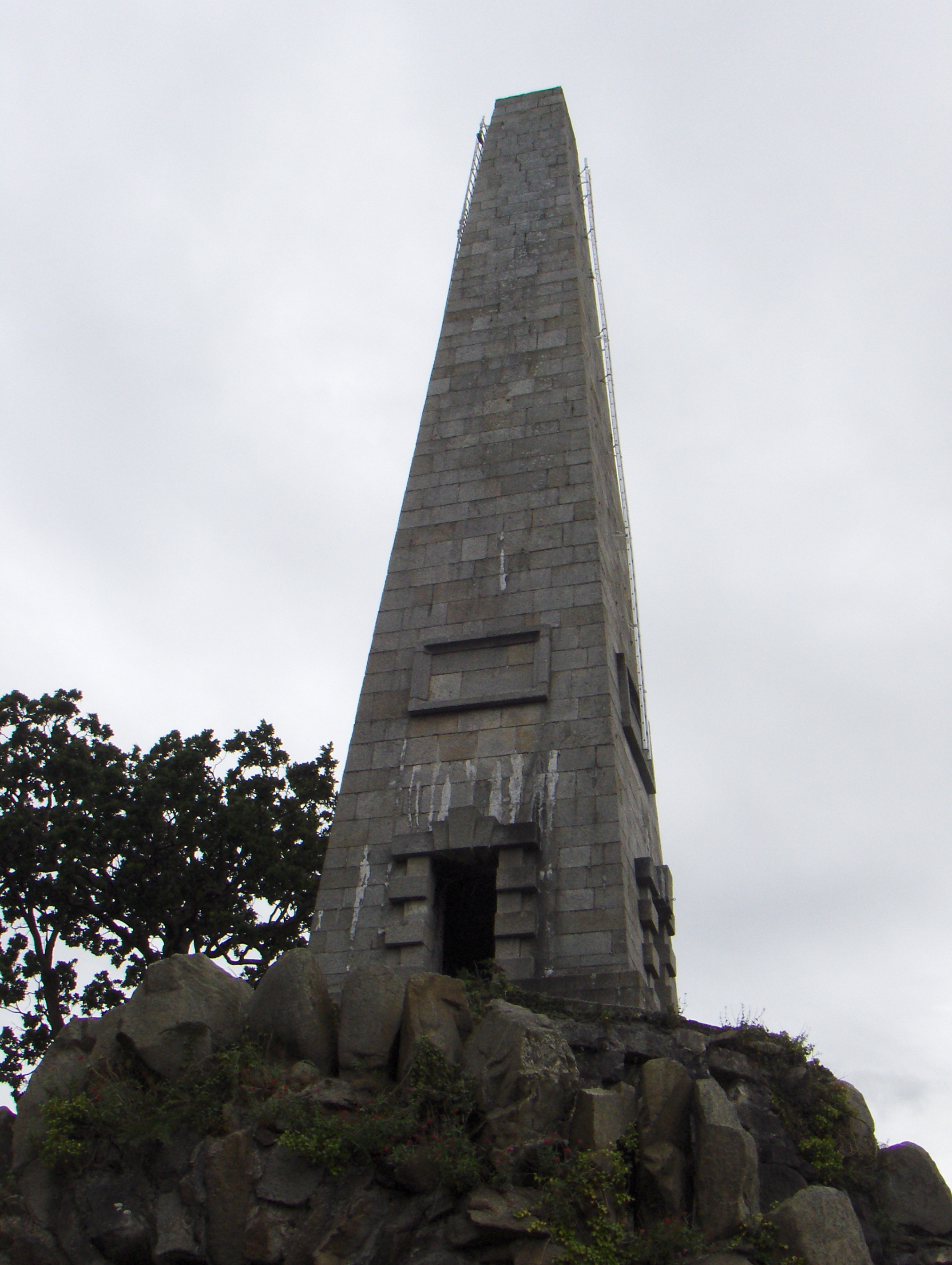 Stillorgan Obelisk Tower